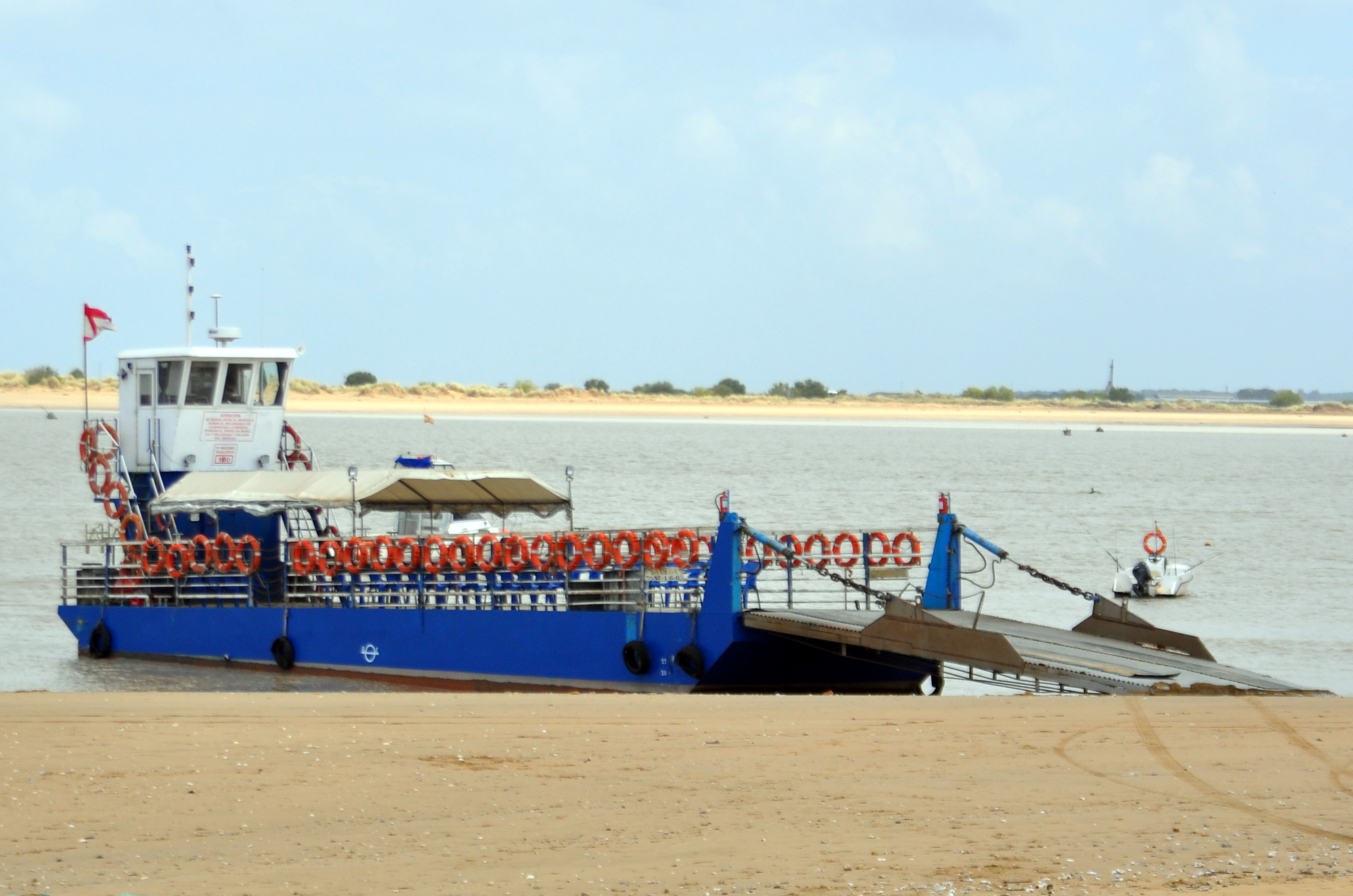 Barcaza que permite cruzar el río Guadalquivir en Sanlúcar de Barrameda (Cádiz, España).